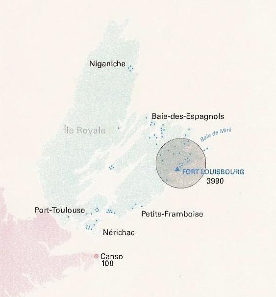 L'île Royale en 1750